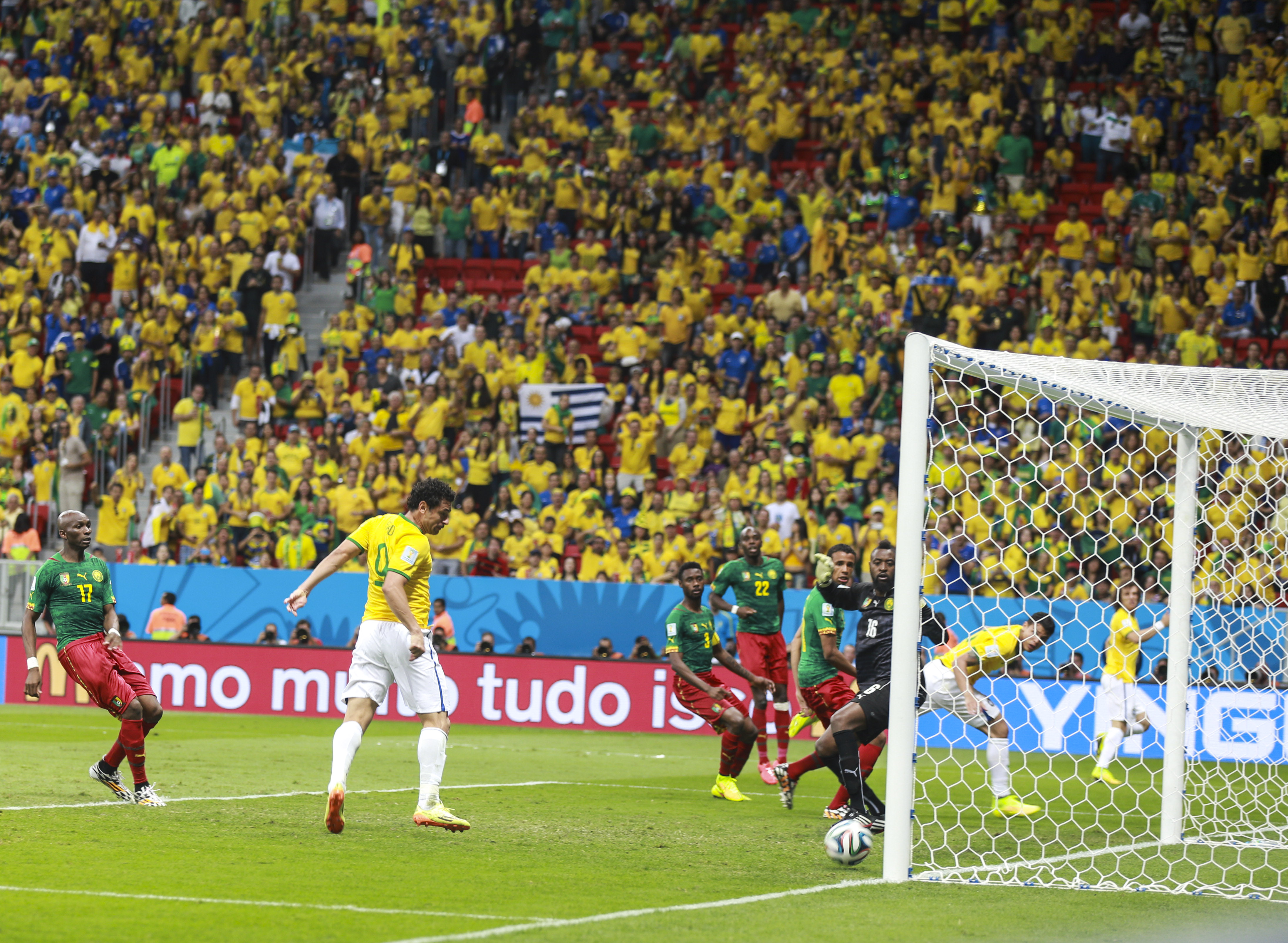 Brasil x Camarões, no Estádio Nacional Mané Garrincha em Brasília.